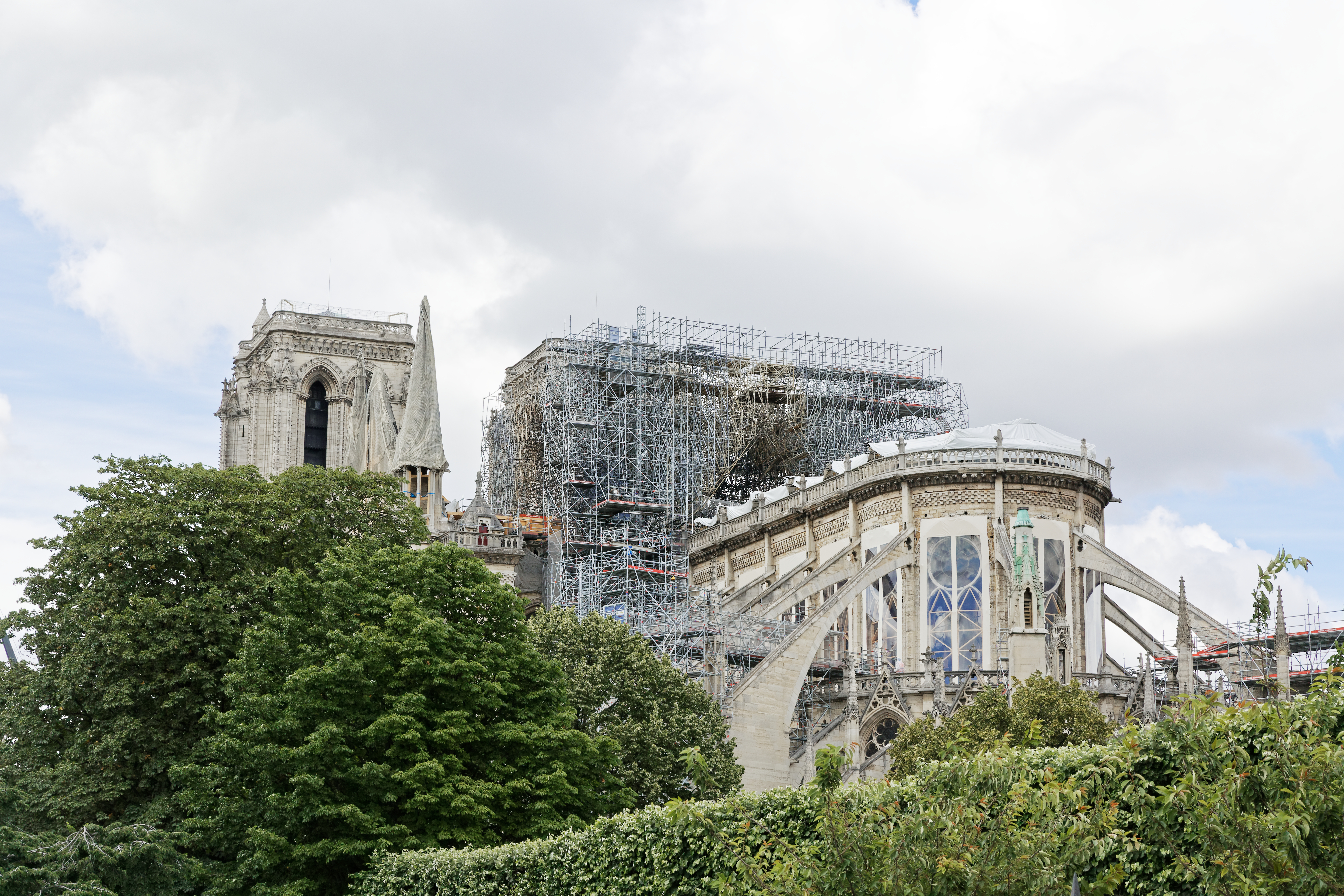 Vue de la cathédrale Notre Dame de Paris.